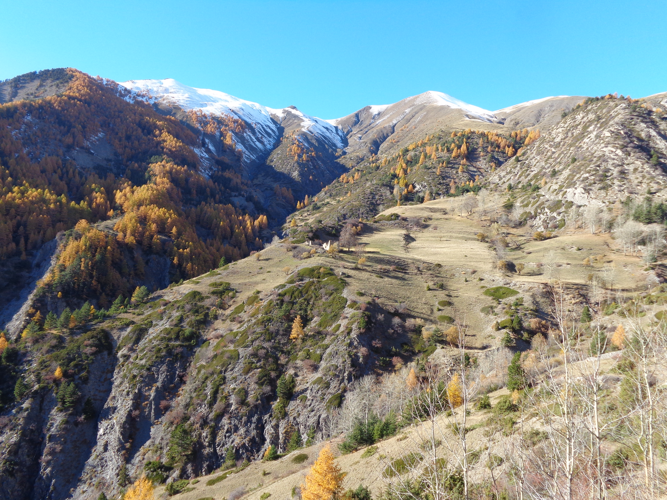 l'ouverture de l'angle de vue est environ de 60°. Cette ferme environnée de ses prés a été habité jusqu'en 1940 environ